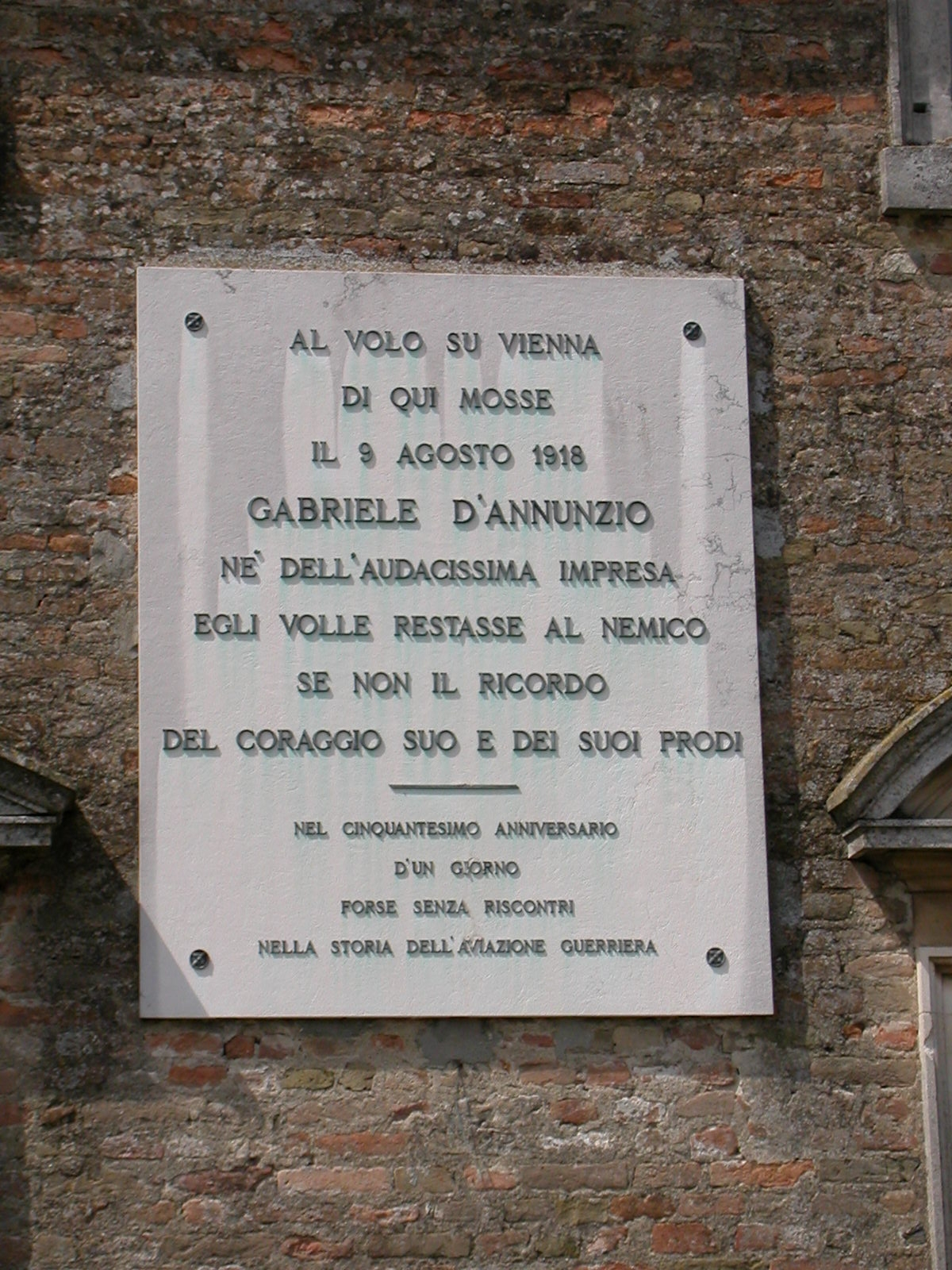 Volo su Vienna, lapide commemorativa.